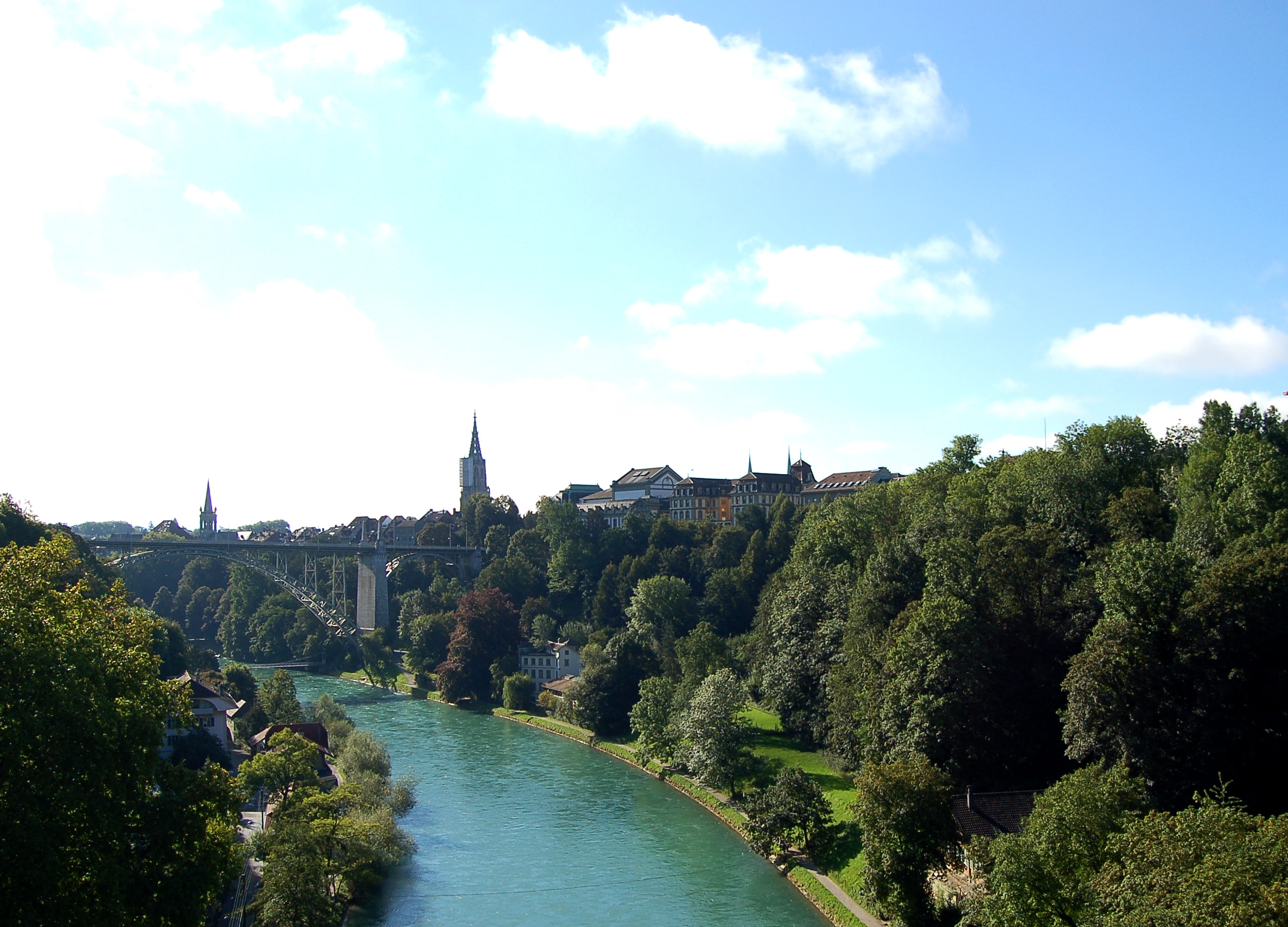 Bern: Aare mit Münster